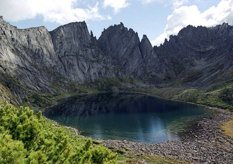 Озеро Медвежье - жемчужина Буреинского заповедника